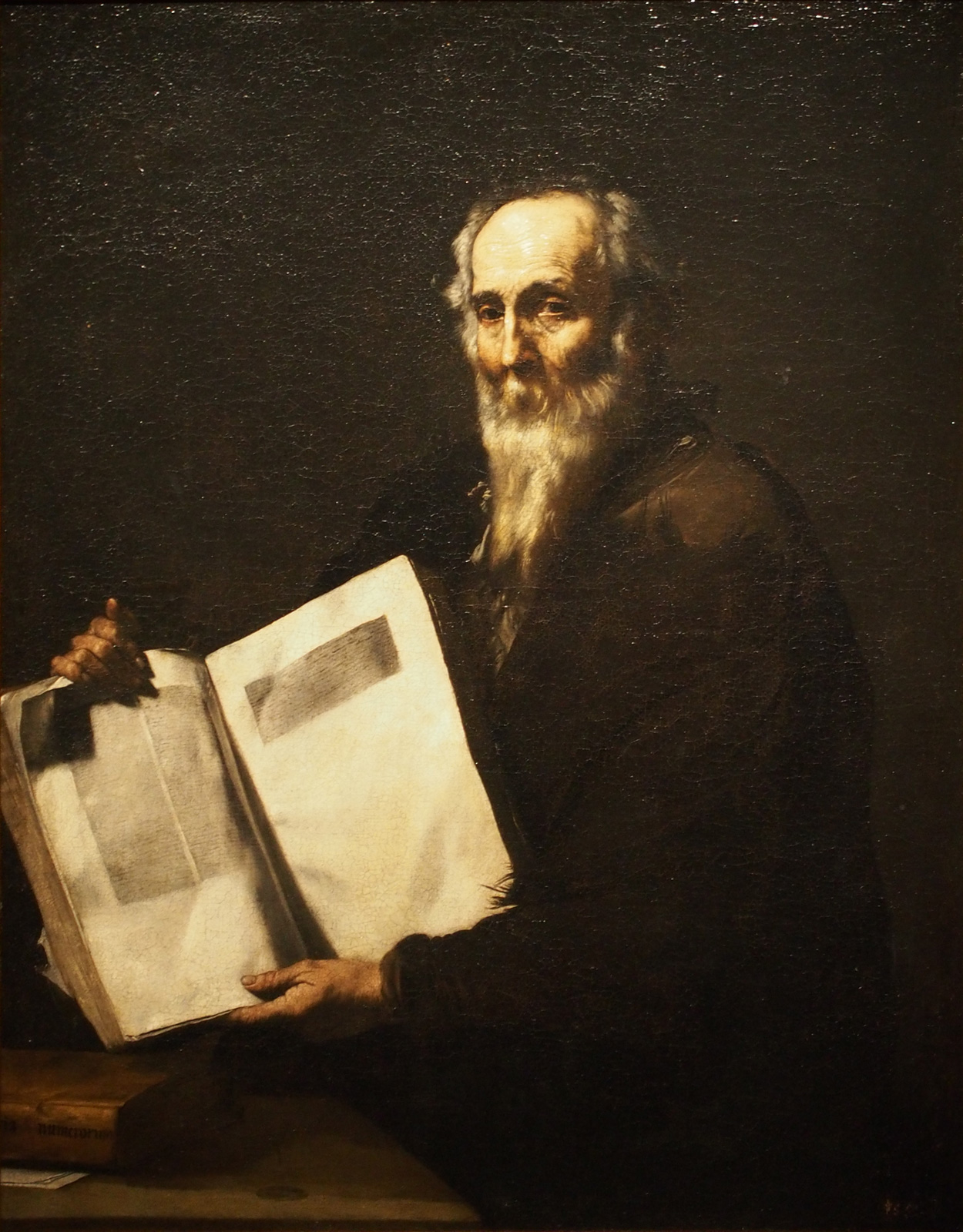 La obra representa al filósofo y matemático griego Pitágoras.